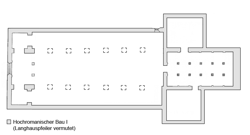 Fritzlar St. Peter Grundriss Bau I